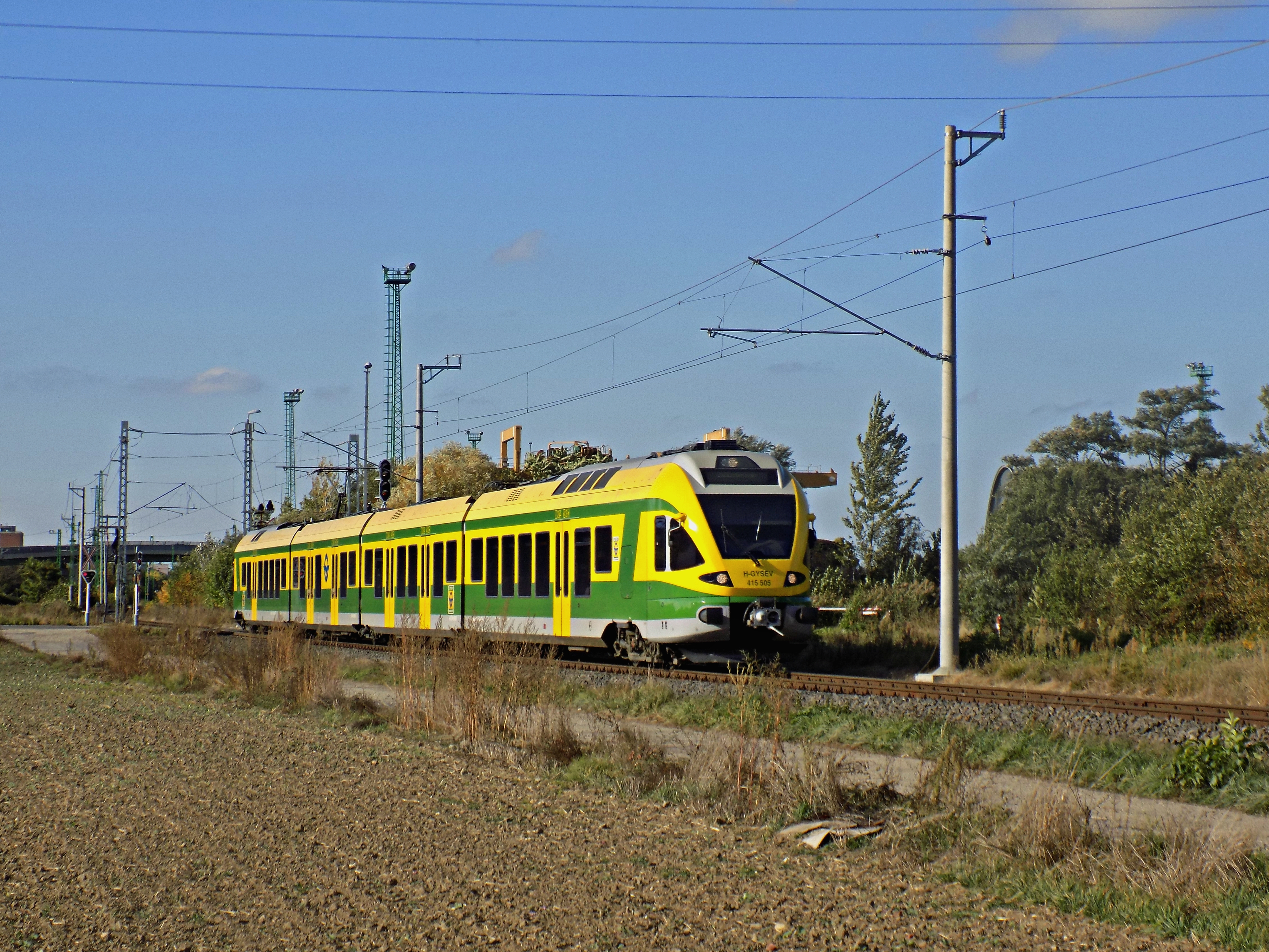 GYSEV Flirttel kiállított személyvonat halad ki Szombathelyről